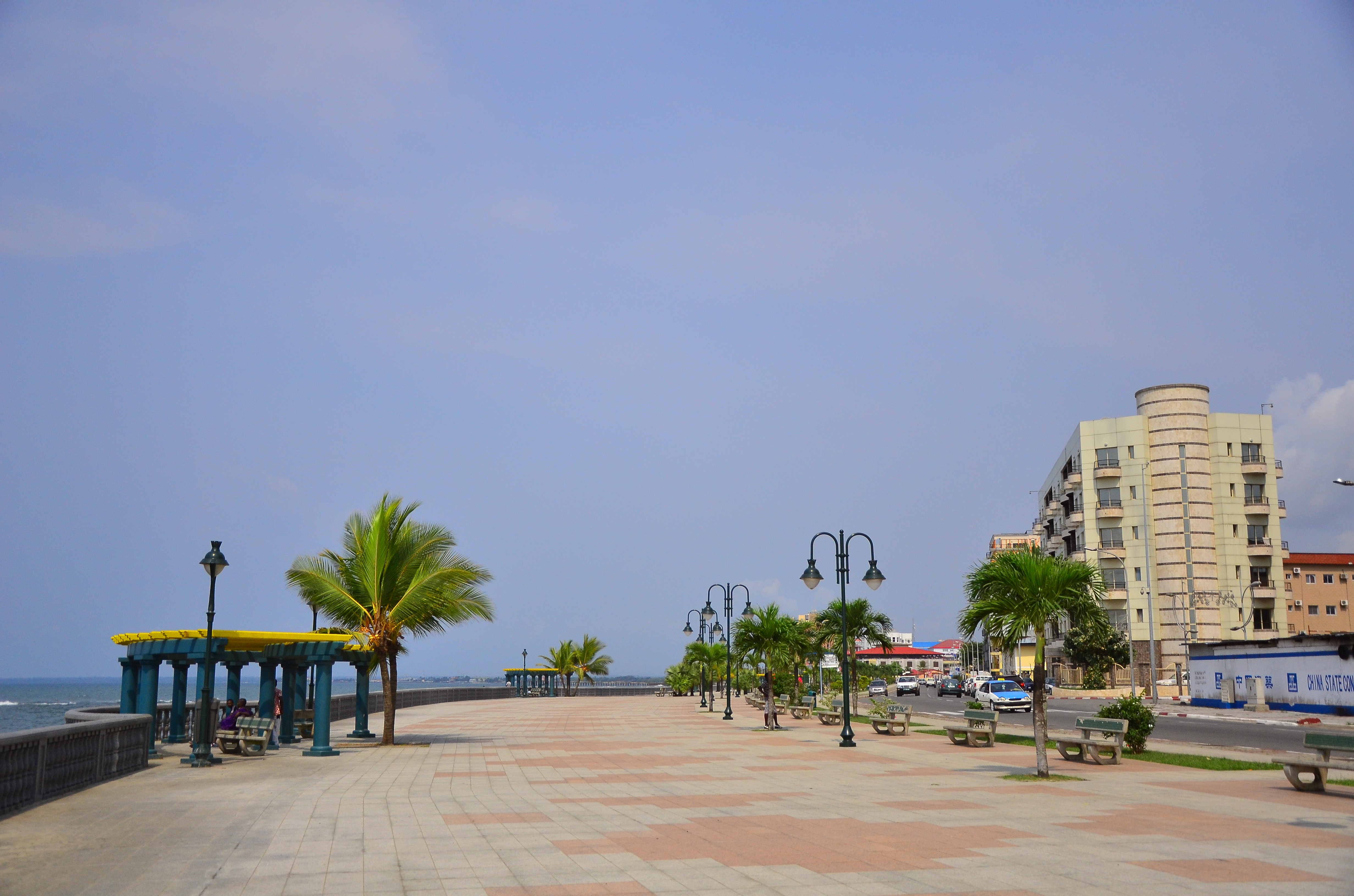 Bata, February 2015